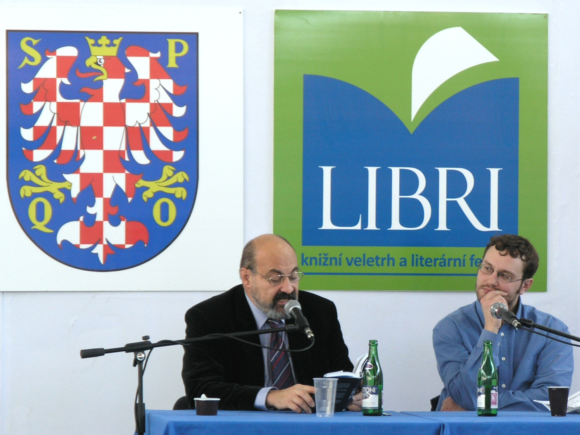 Olomouc, LIBRI 2008 - Tomáš Halík, autorské čtení z knihy Dotkni se ran